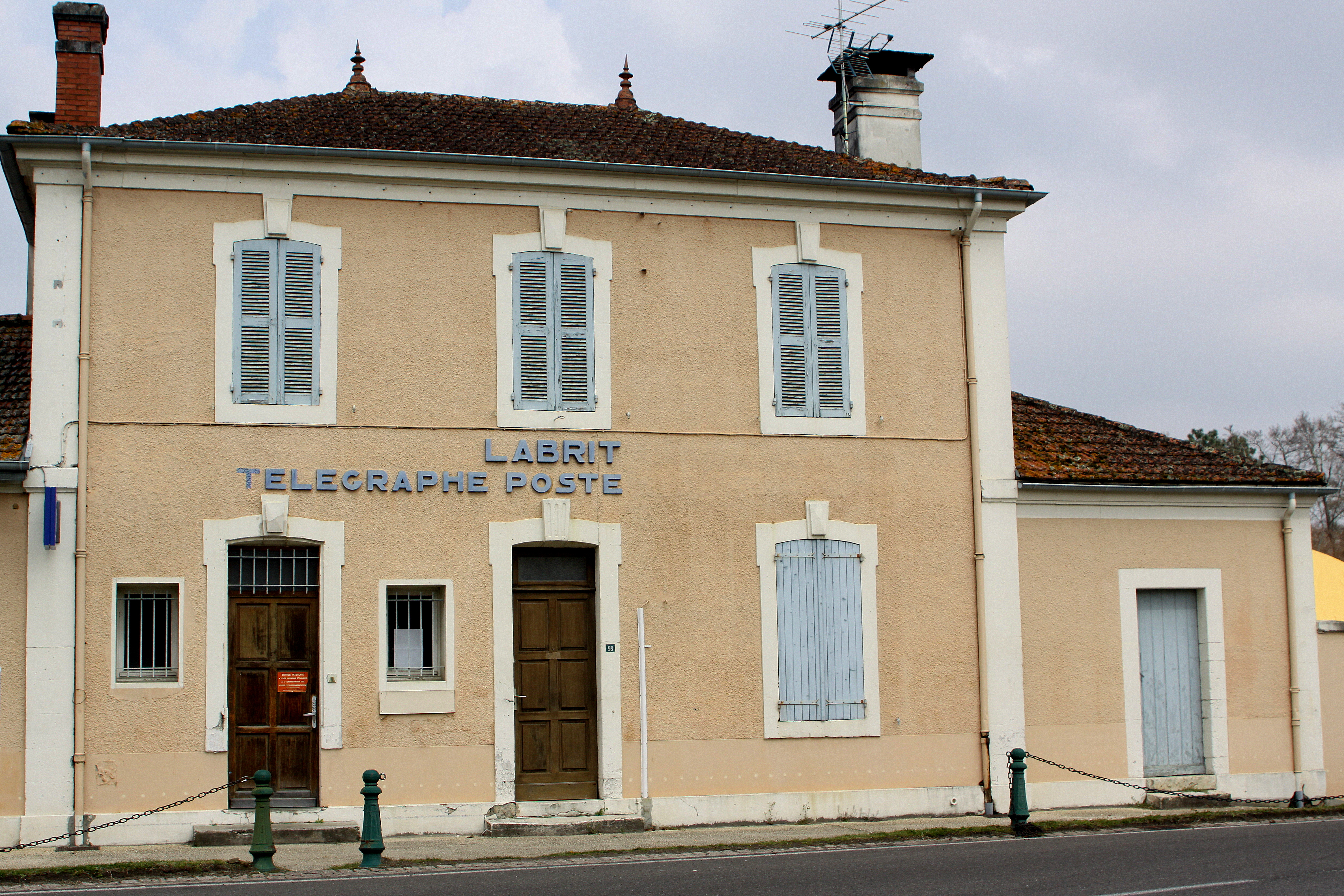 De Post- an Telegraphebüro vu Labrit